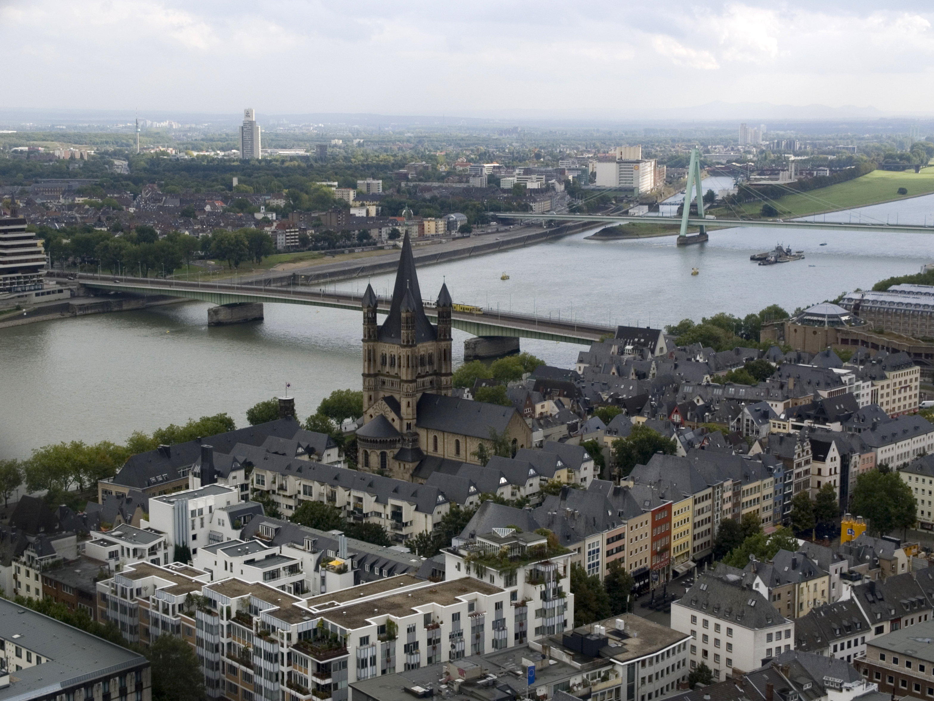 Северный Рейн-Вестфалия, Кёльн - вид на мосты Дойц и Святого Северина с колокольни Кёльнского собора